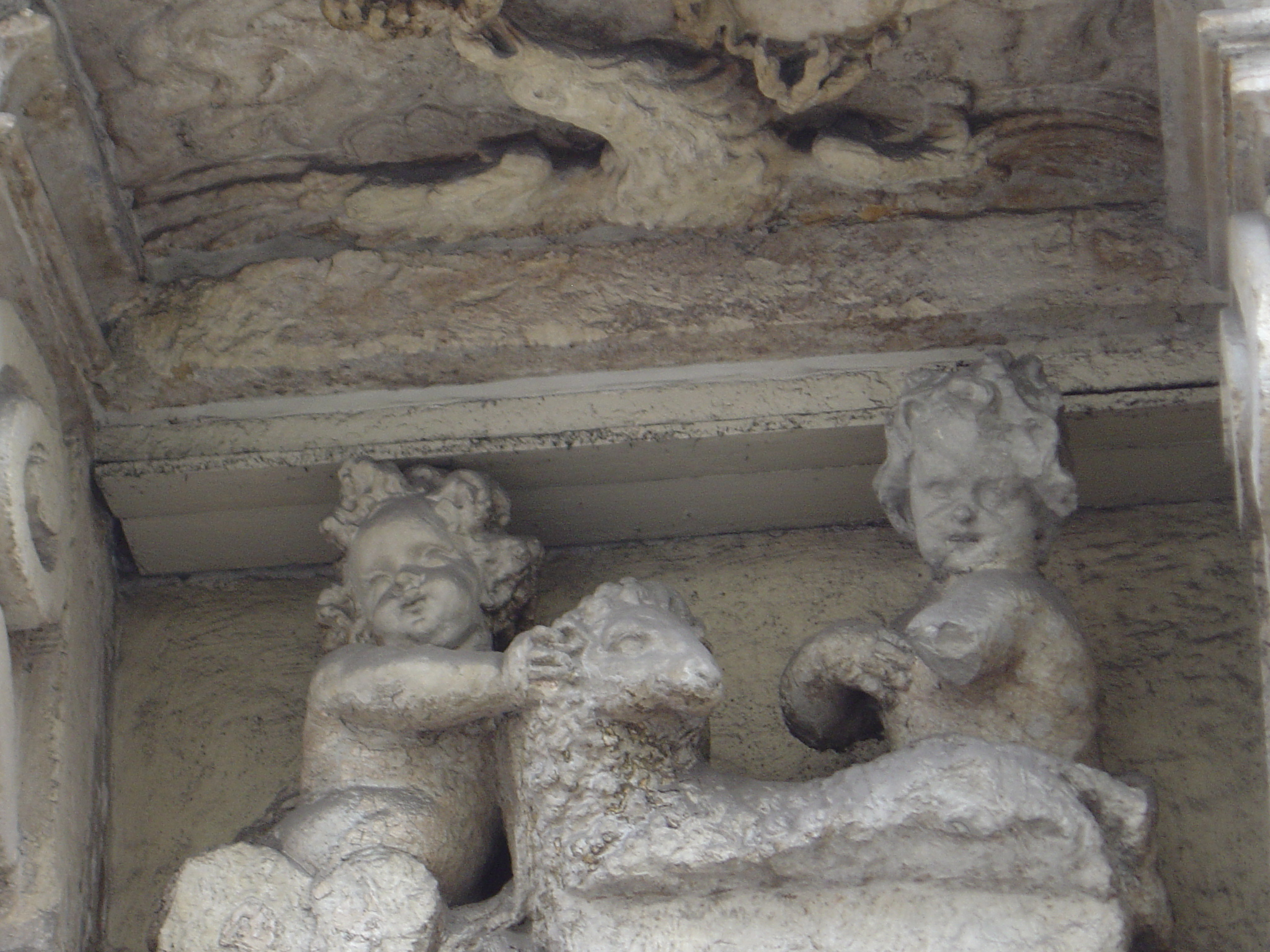 Bruxelles photo de l'Agneau Blanc, sculpture par Pierre van Dievoet, 1695